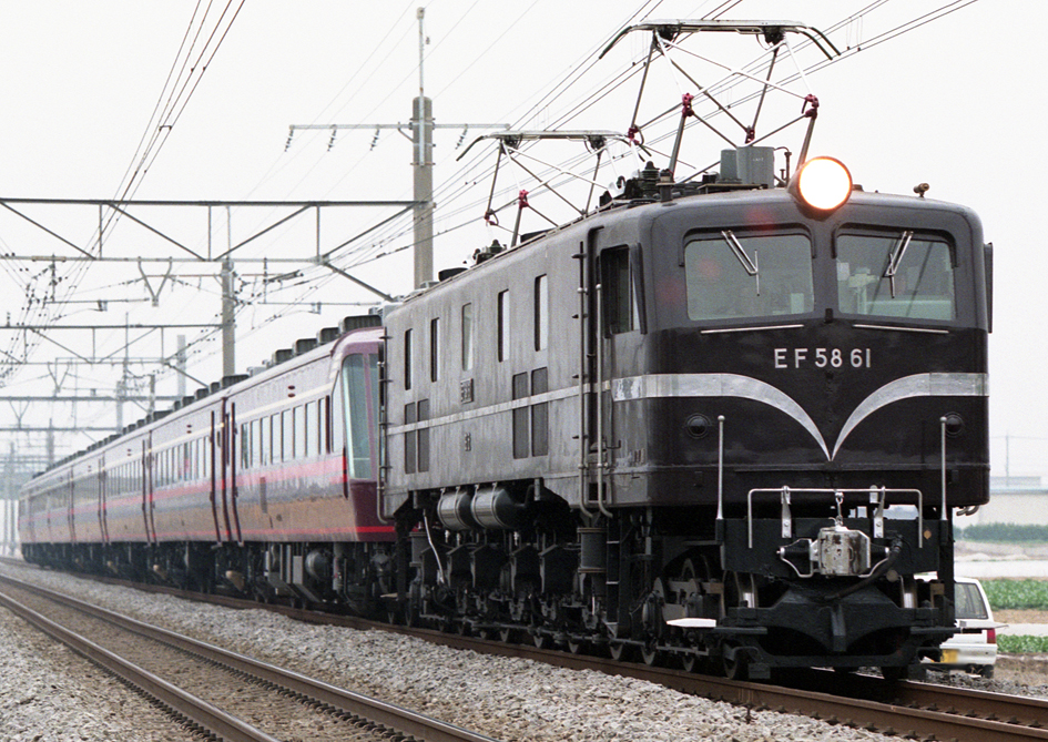 JR東日本 EF58 61けん引 「サロンエクスプレス東京」